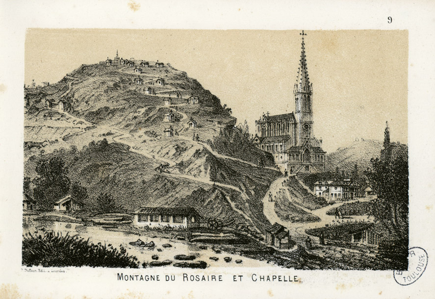 Fait partie d'un album de 18 planches lithographiées dont certaines sont signées. Pl. imprimées chez Monrocq à Paris. Titre en lettres d'or sur le plat supérieur. Les dessins des lithographies n° 5, 6, 7, 13 paraissent signés André Gorse. L'identification est certaine car le dessin original de la lithographie n°4 est signé A. Gorse. Ancely, René (1876 - 1966). Possesseur